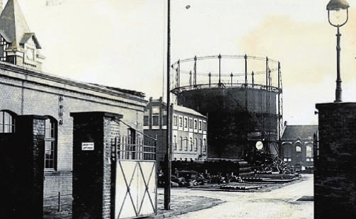 Historische Aufnahme des Gasometers der damaligen Gaswerke Hamm